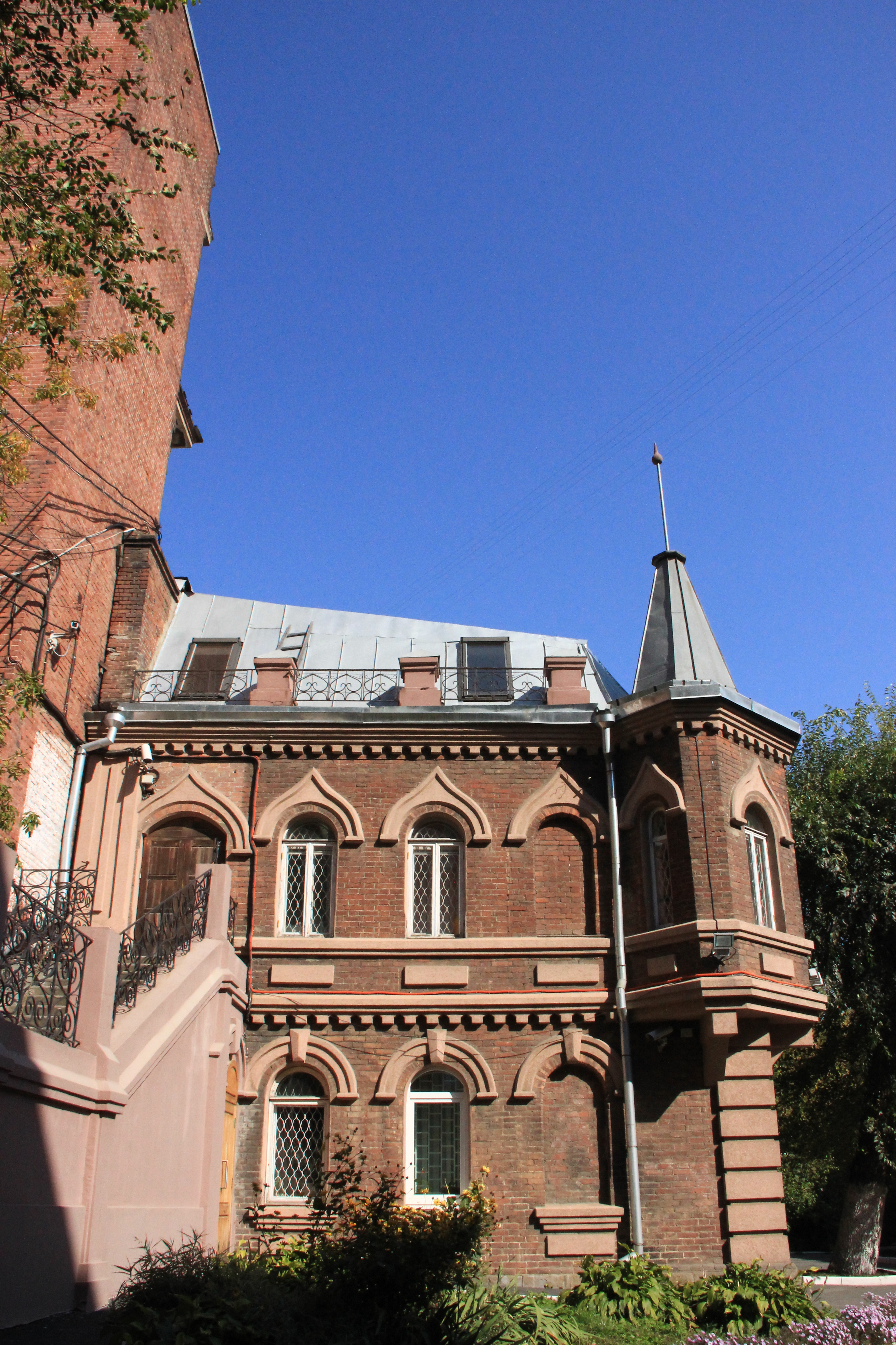 Здание Восточного института (Приморский край, Владивосток, Светланская, 73-А)